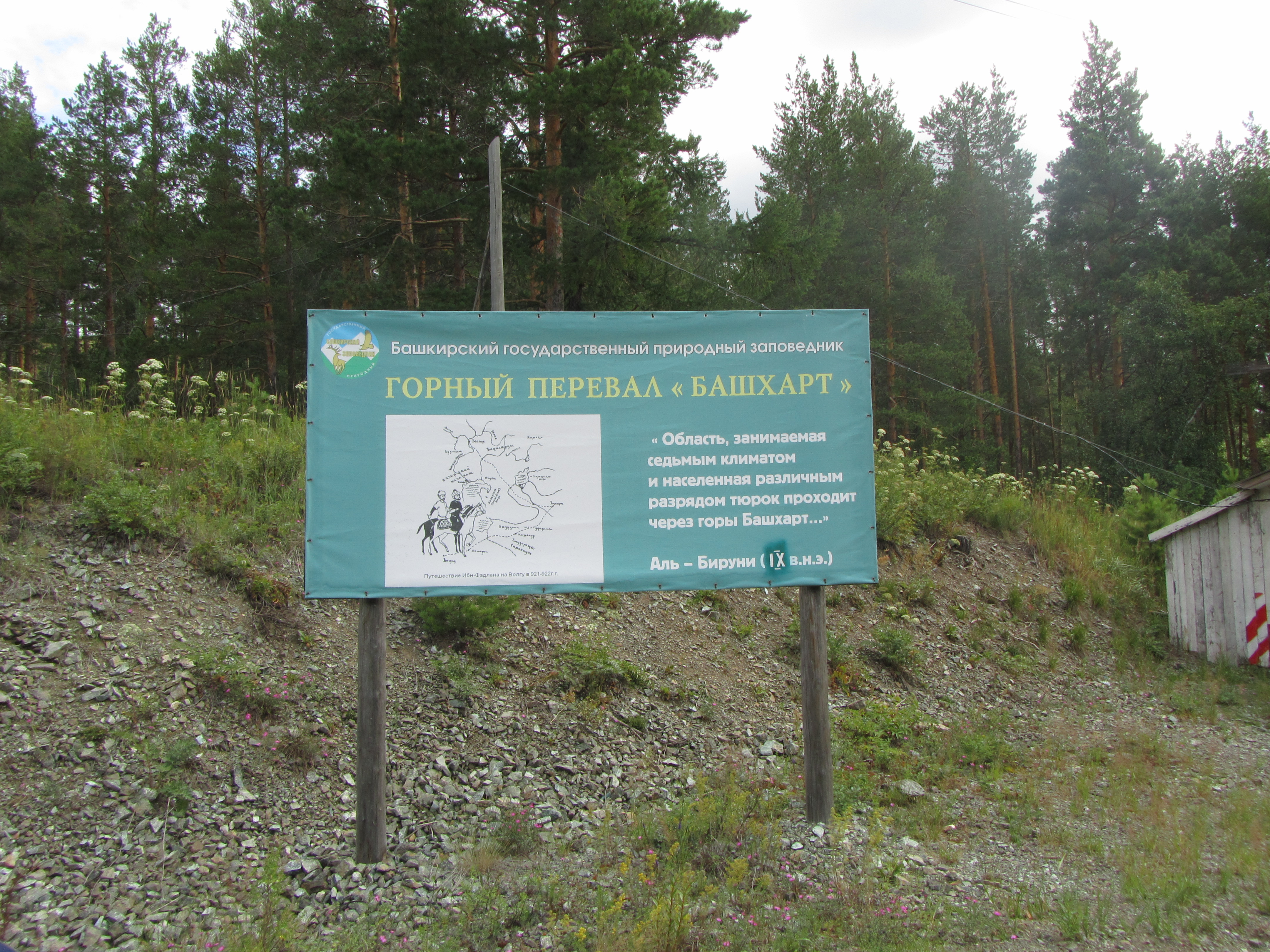 Горный перевал Башхард в Башкирском государственном заповеднике Башҡортса: Башҡорт ҡурсаулығында Башхард артылышы